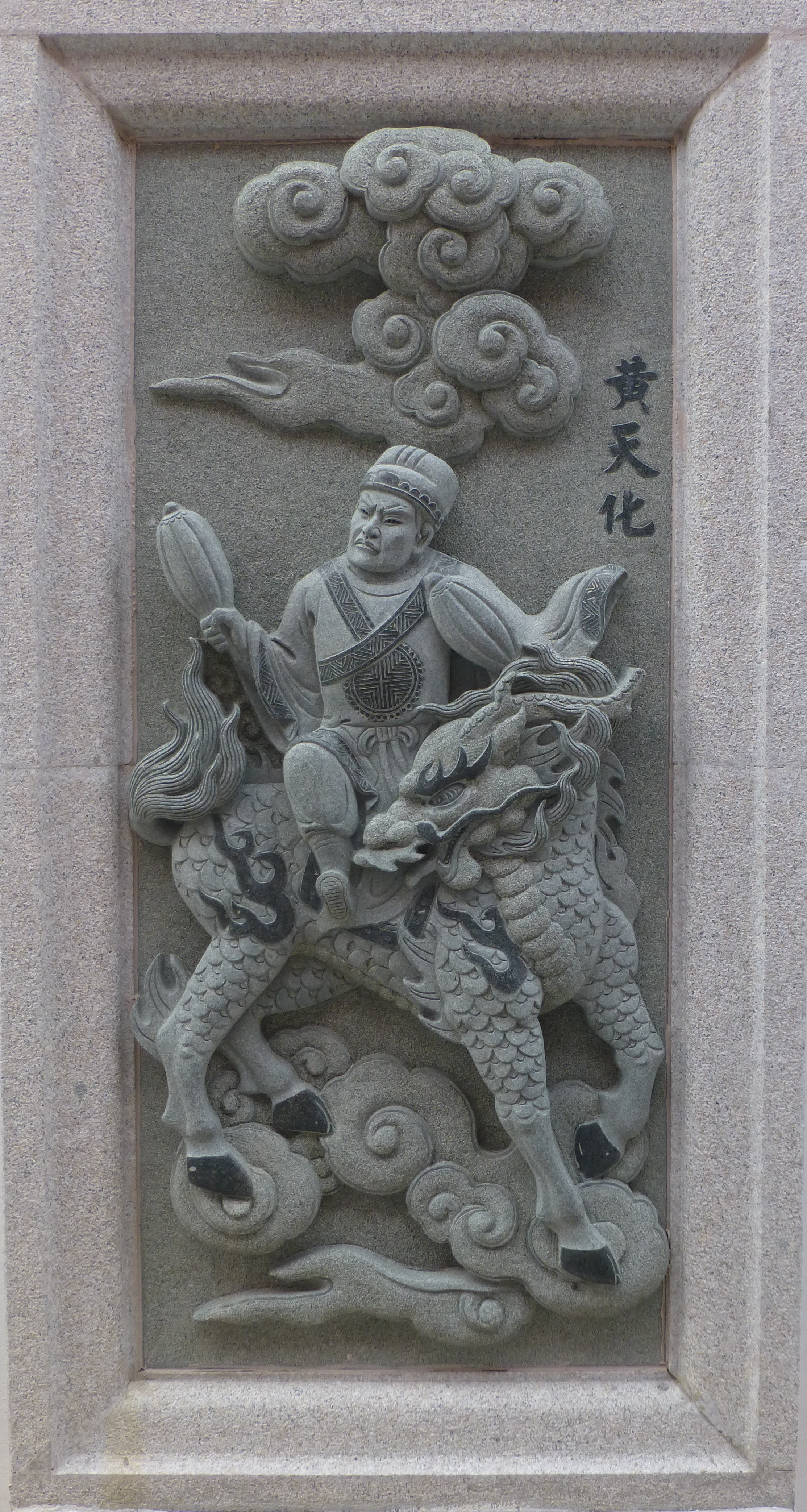 012 Huang Tian Hua, Investiture of the Gods at Ping Sien Si, Pasir Panjang, Perak, Malaysia Photograph from the Ping Sien Si Temple in Perak, Malaysia taken by Anandajoti.